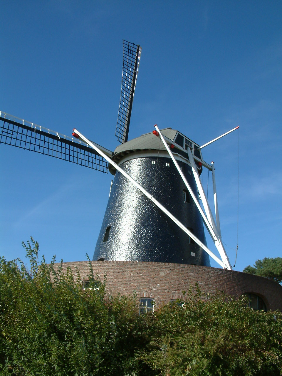 Molen Op de Vrouwenheide te Ubachsberg